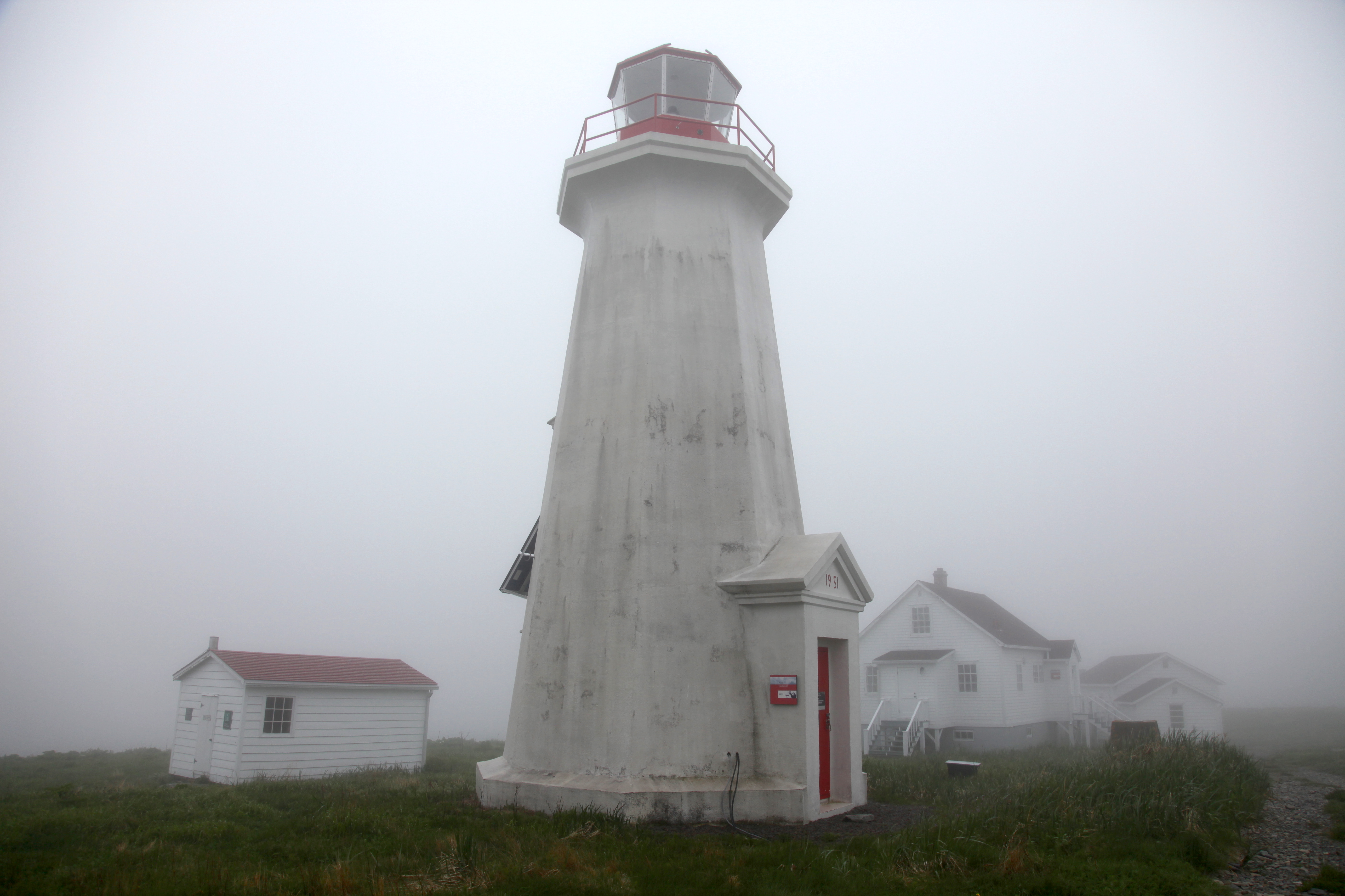 Le phare patrimonial de l’Île aux Perroquets est associé au thème de l’amélioration de l’infrastructure des stations de phare dans les années 1950, particulièrement dans le golfe du Saint-Laurent. Il constitue un très bon exemple de la modernisation des équipements d’aide à la navigation sur les stations de phare à cette période. Érigé comme une tour octogonale effilée en béton armé en 1951 pour remplacer le phare en bois datant de 1888, elle a permis une navigation plus sécuritaire pour les bateaux de pêche et les paquebots faisant l’approvisionnement dans la région. Le site comprend sept bâtiments connexes qui contribuent au caractère patrimonial du phare: (1) logement du gardien de phare, construit en 1951; (2) logement du gardien subalterne, construit en 1951; (3) le criard à brume construit datant des années 1950; (4) la forge construite en 1952; (5) la remise à provisions construite en 1954; (6) le poulailler construit en 1952; (7) le hangar à bateau construit en 1908 à 1915.